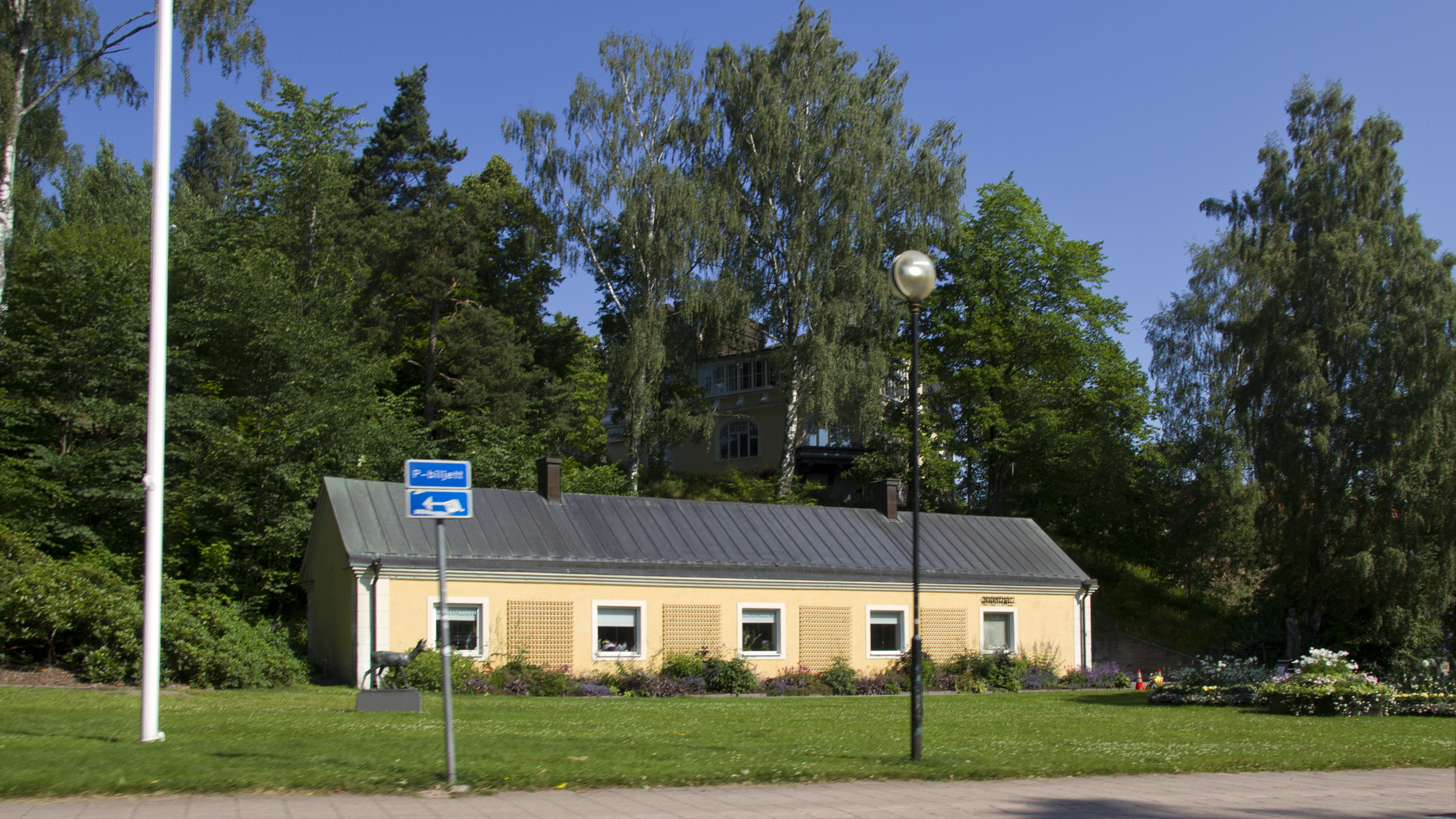 Bohult, Karlskoga, Sweden